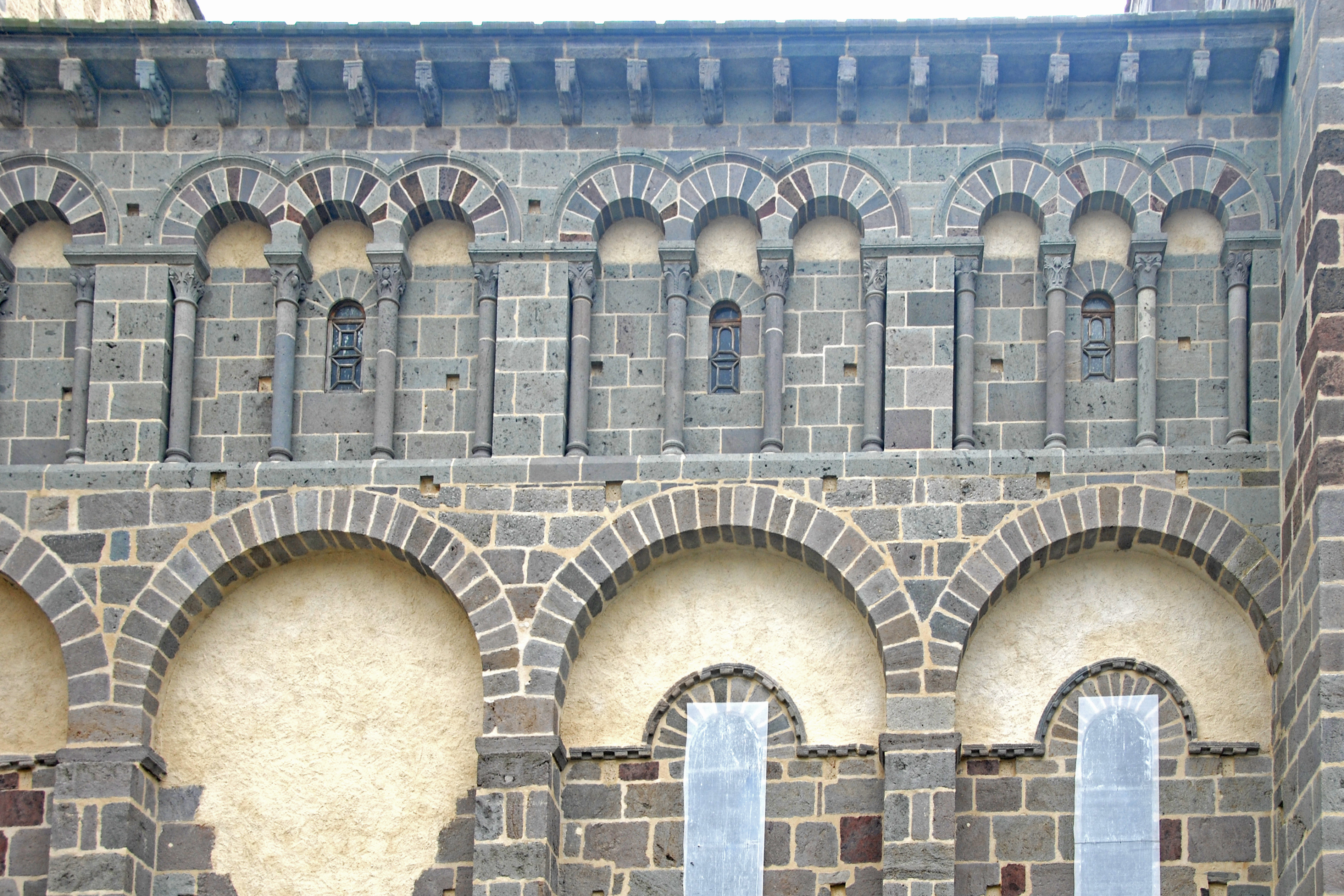 St.-Nectaire, Langhausarkatur, Nordseite